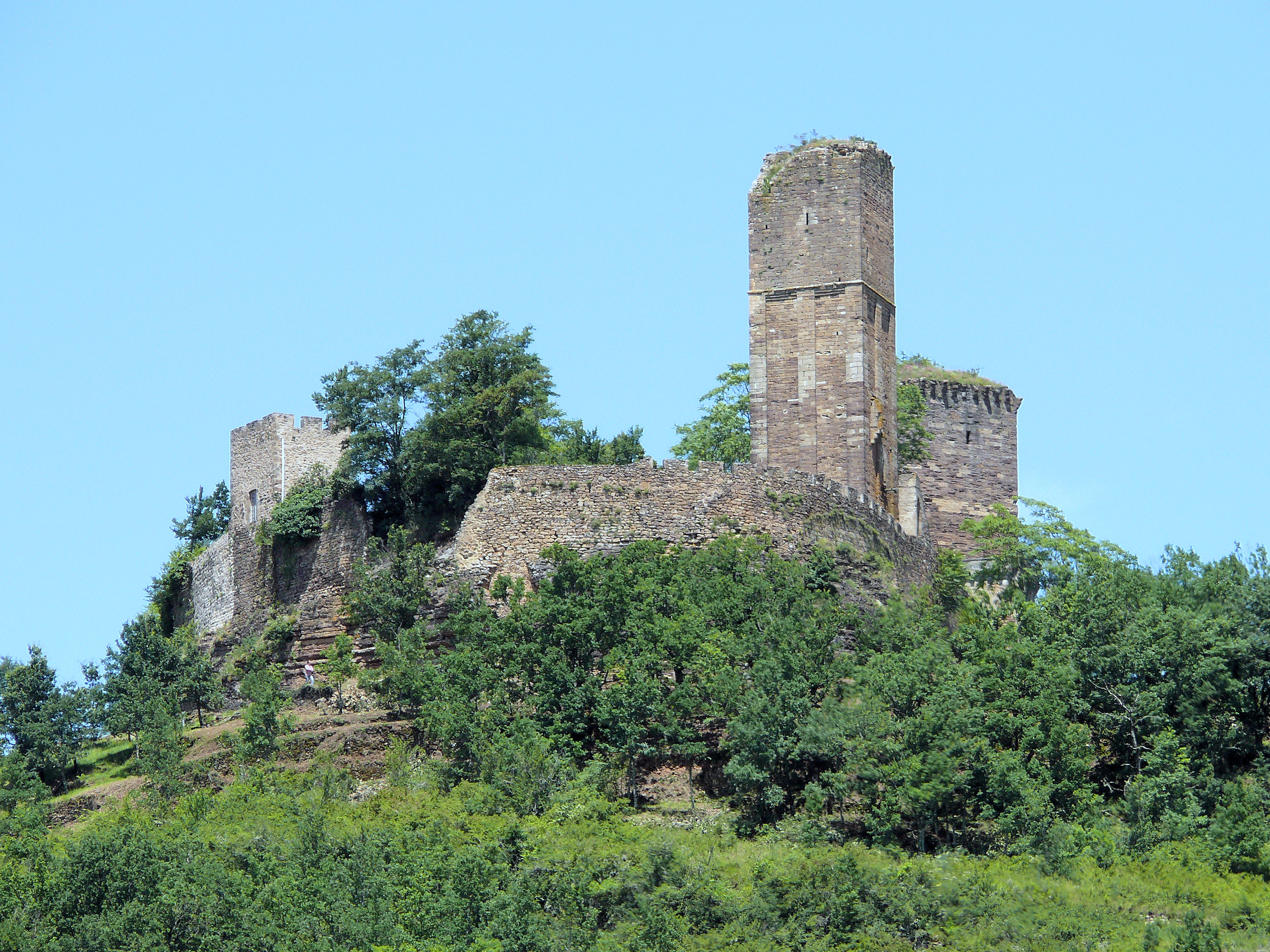 Saint-Laurent-les-Tours - Enceinte